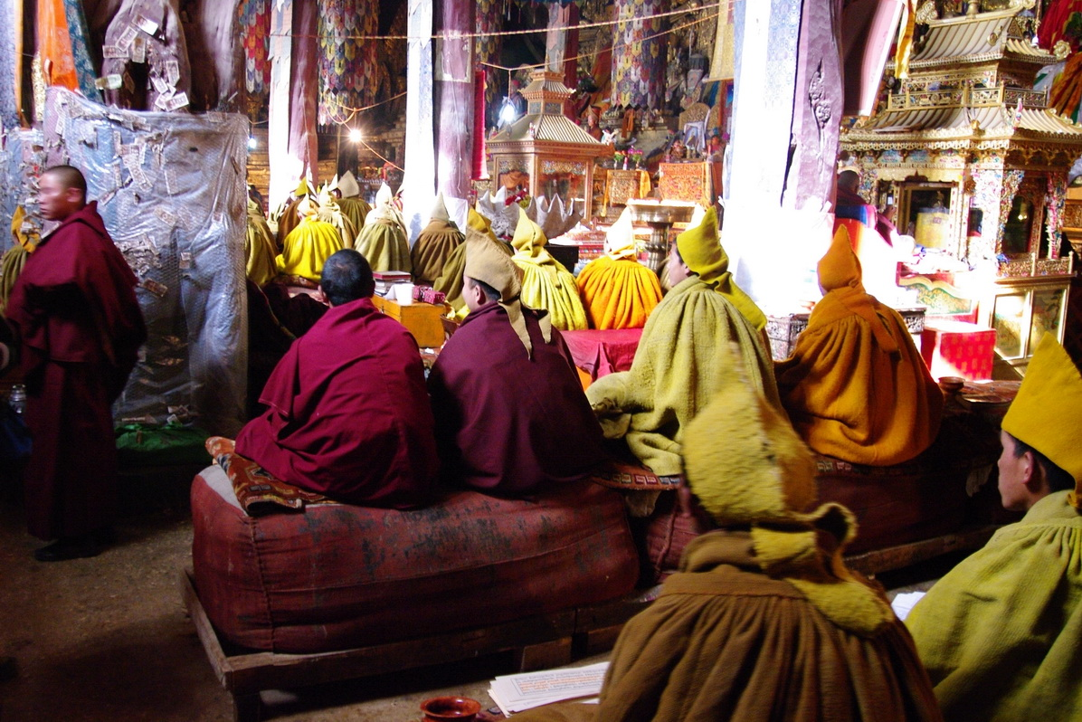 Gelbmützen-Mönche in der Versammlungshalle des Südklosters Sakya